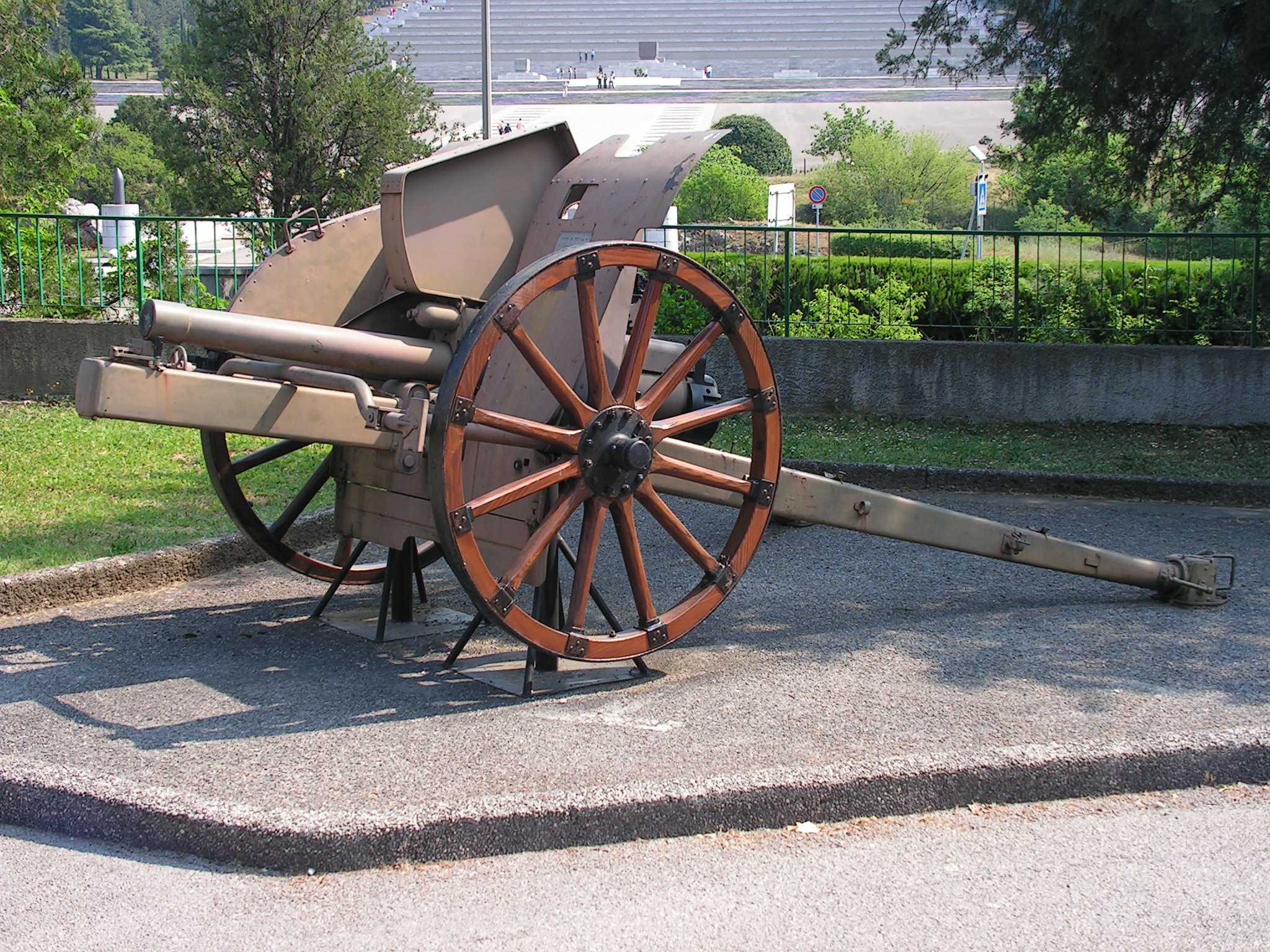 Italian cannon 75/27 mod. 1911.